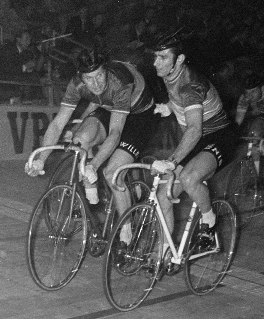 Peter Post (left) and Romain De Loof